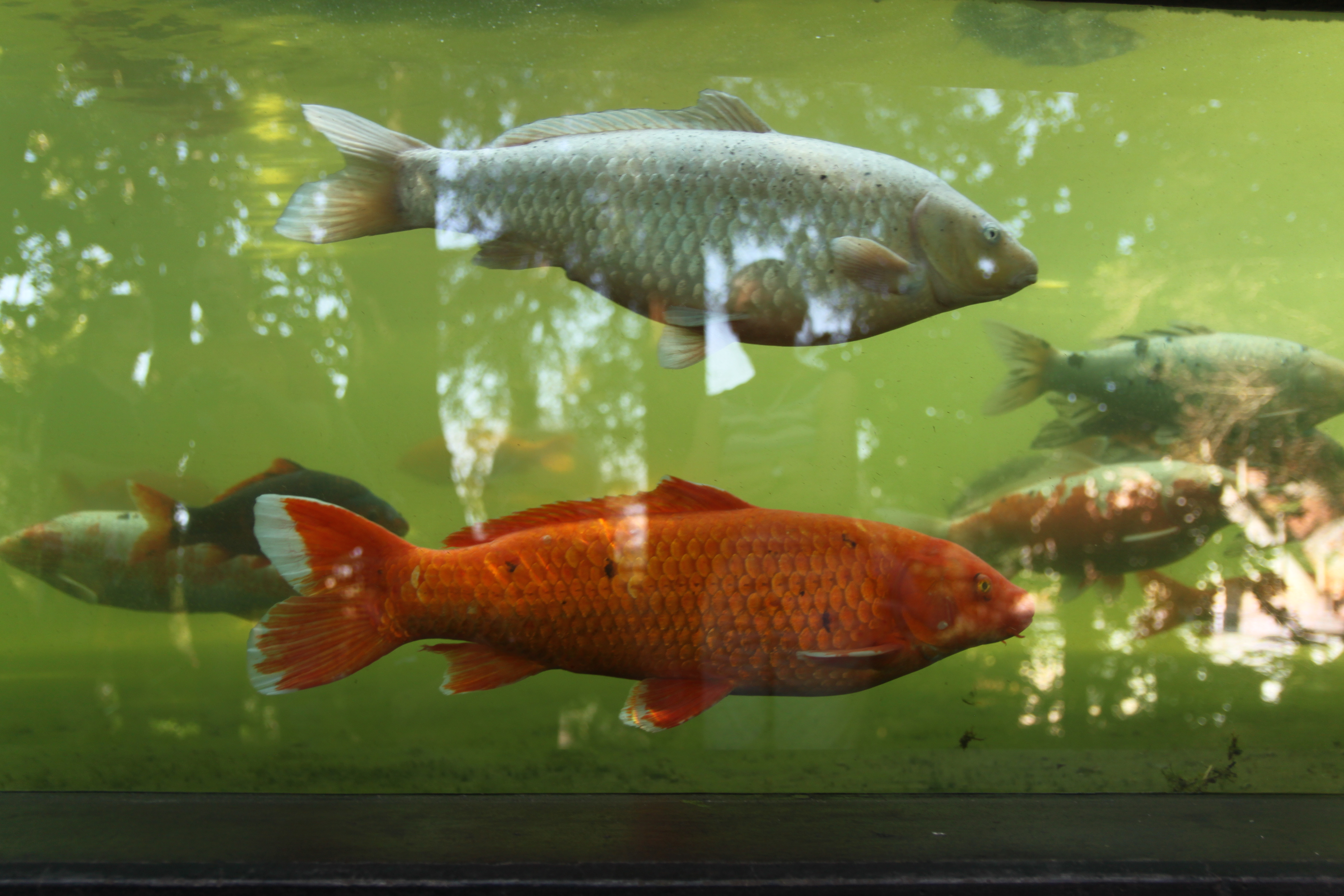 Madeira - Monte Palace - fish tank